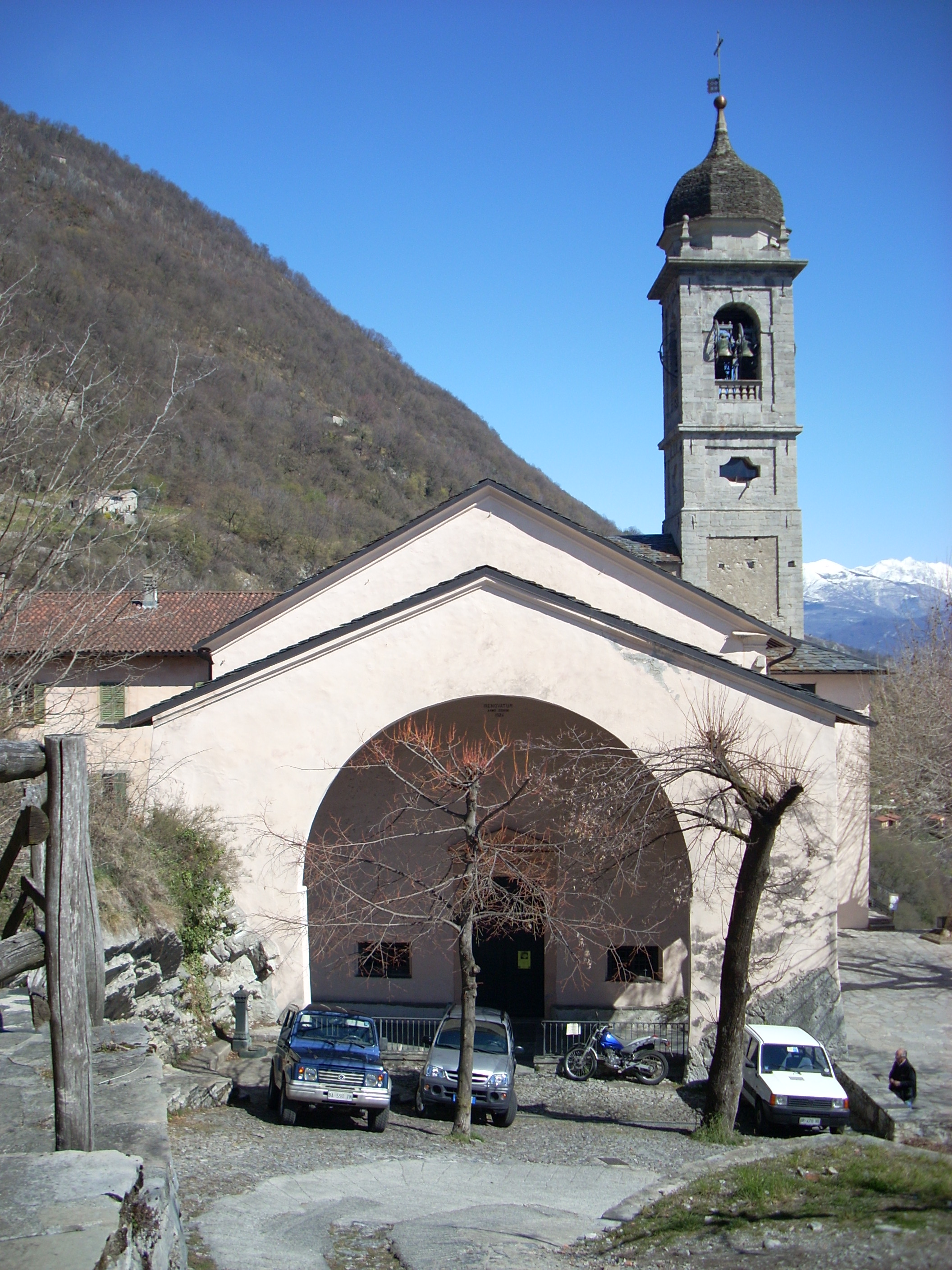 Santuario della Beata Vergine del Soccorso, Ossuccio, Como, Italy